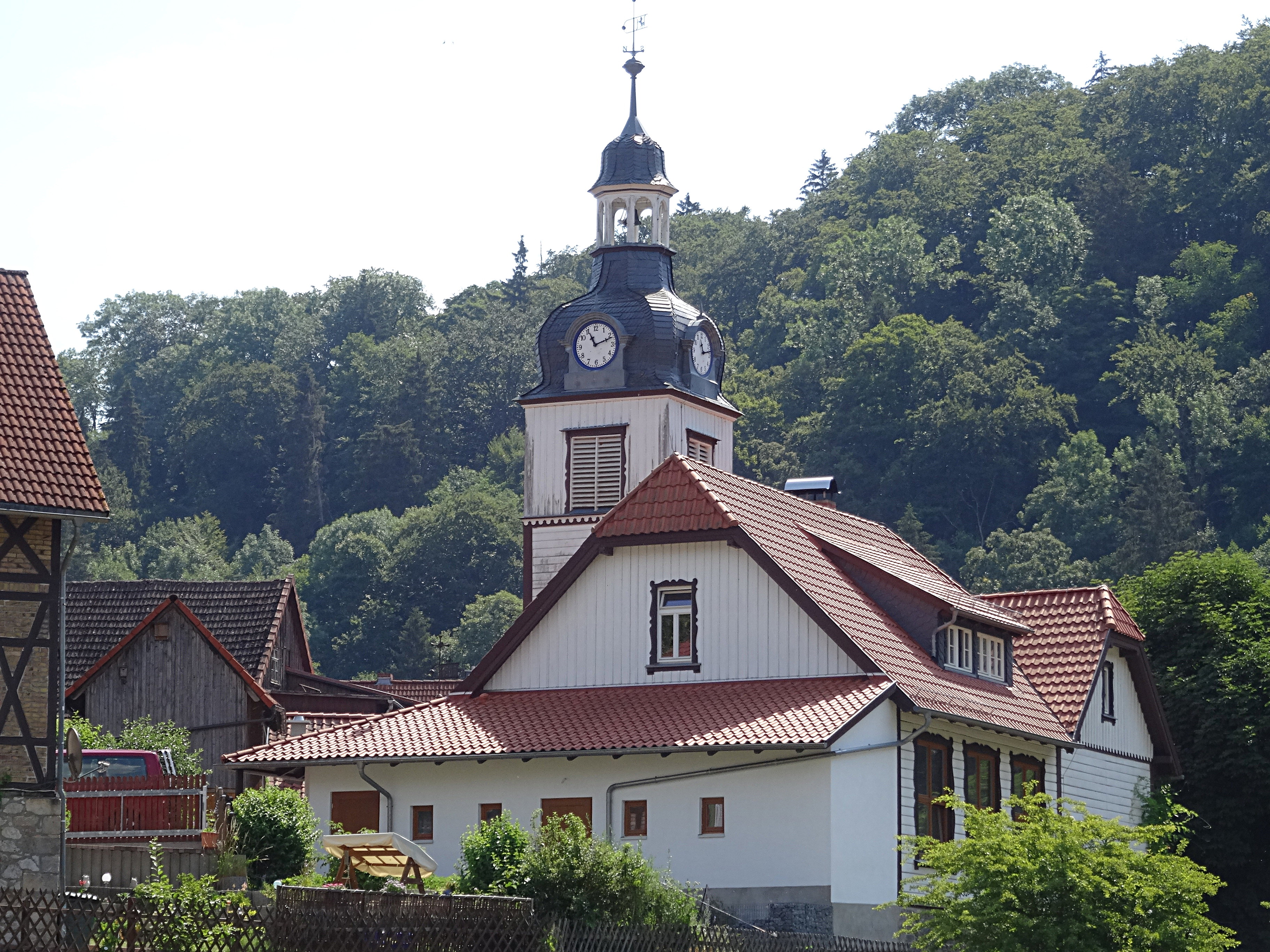 neue Schulkirche von 1905 am Hüttenplatz in Neuwerk